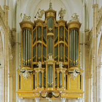 Strumphlerorgel Eusebiuskerk Arnhem